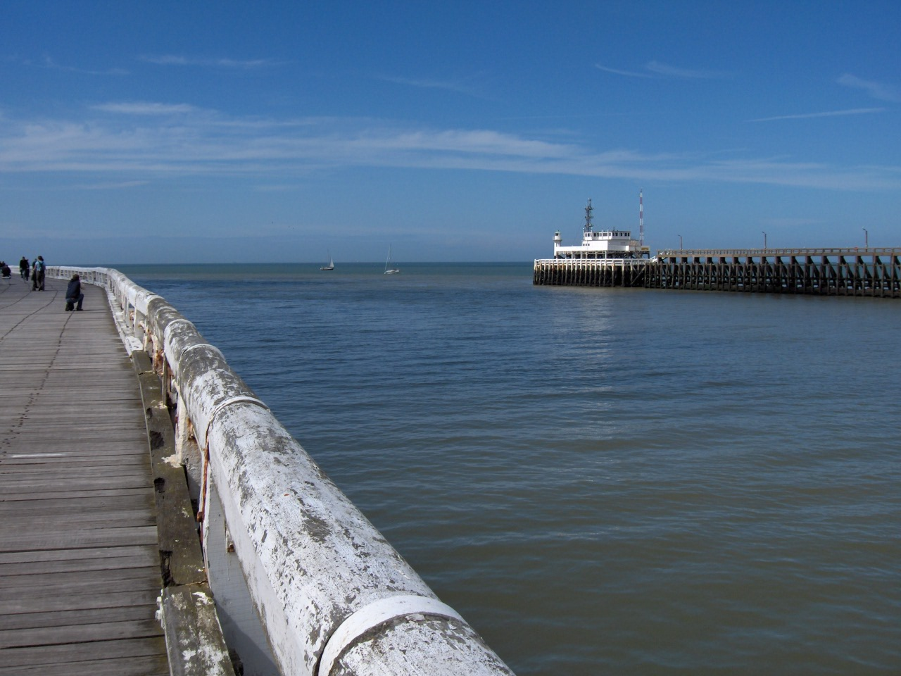 Oostende - Belgium harbor entrance between two piers